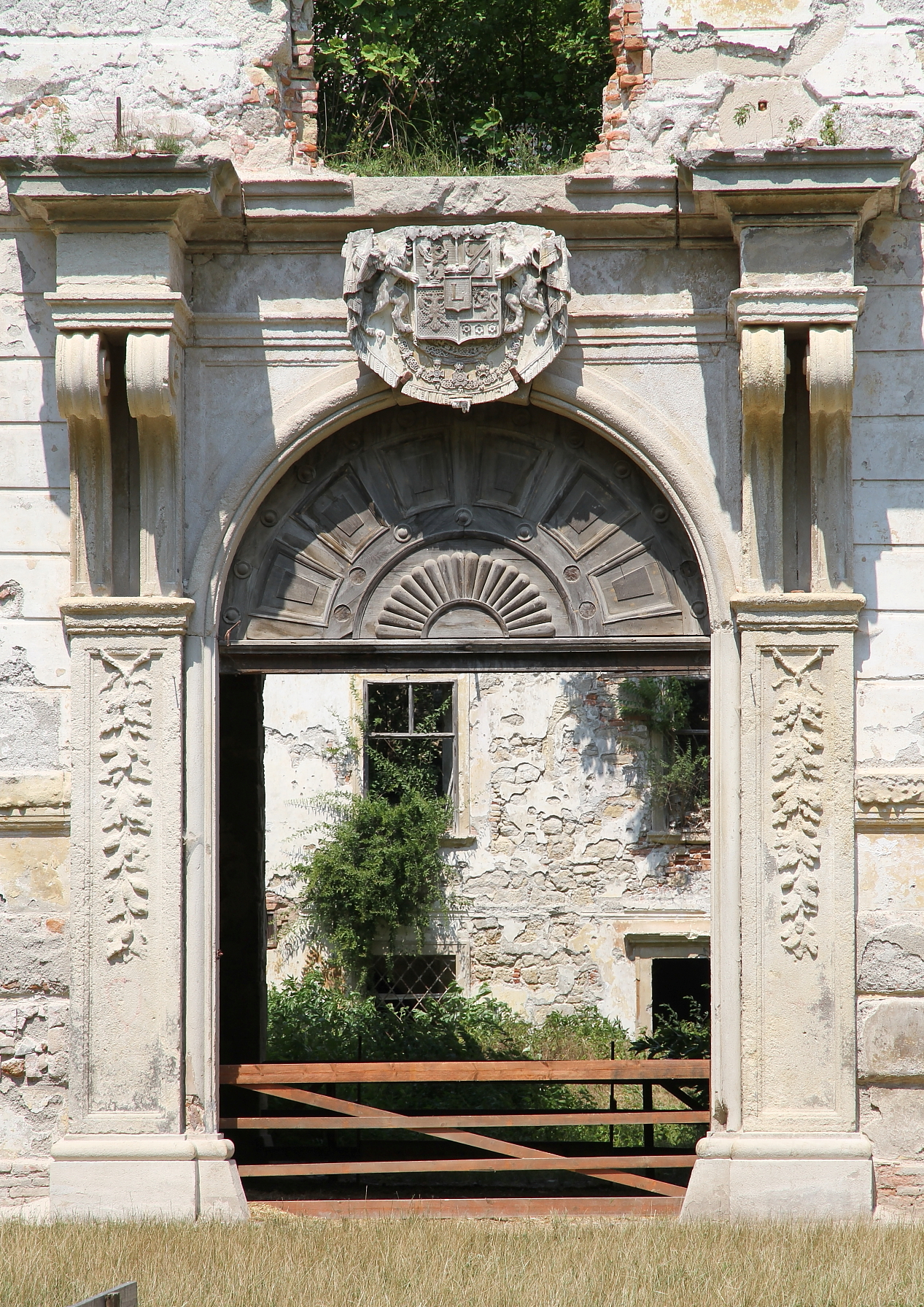 Das Portal der Pottendorfer Schlossruine.